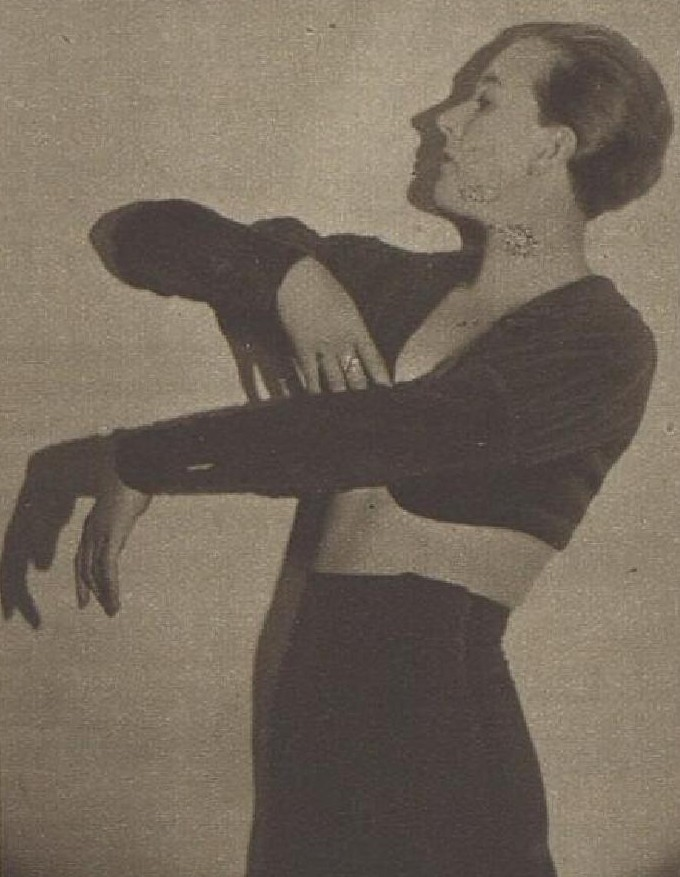 Nina Jirsíková (1910-1978), česká tanečnice, choreografka, kostýmní výtvarnice, libretistka, kreslířka a pedagožka.